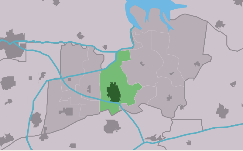 Kaartsje fan himrik fan Kollum